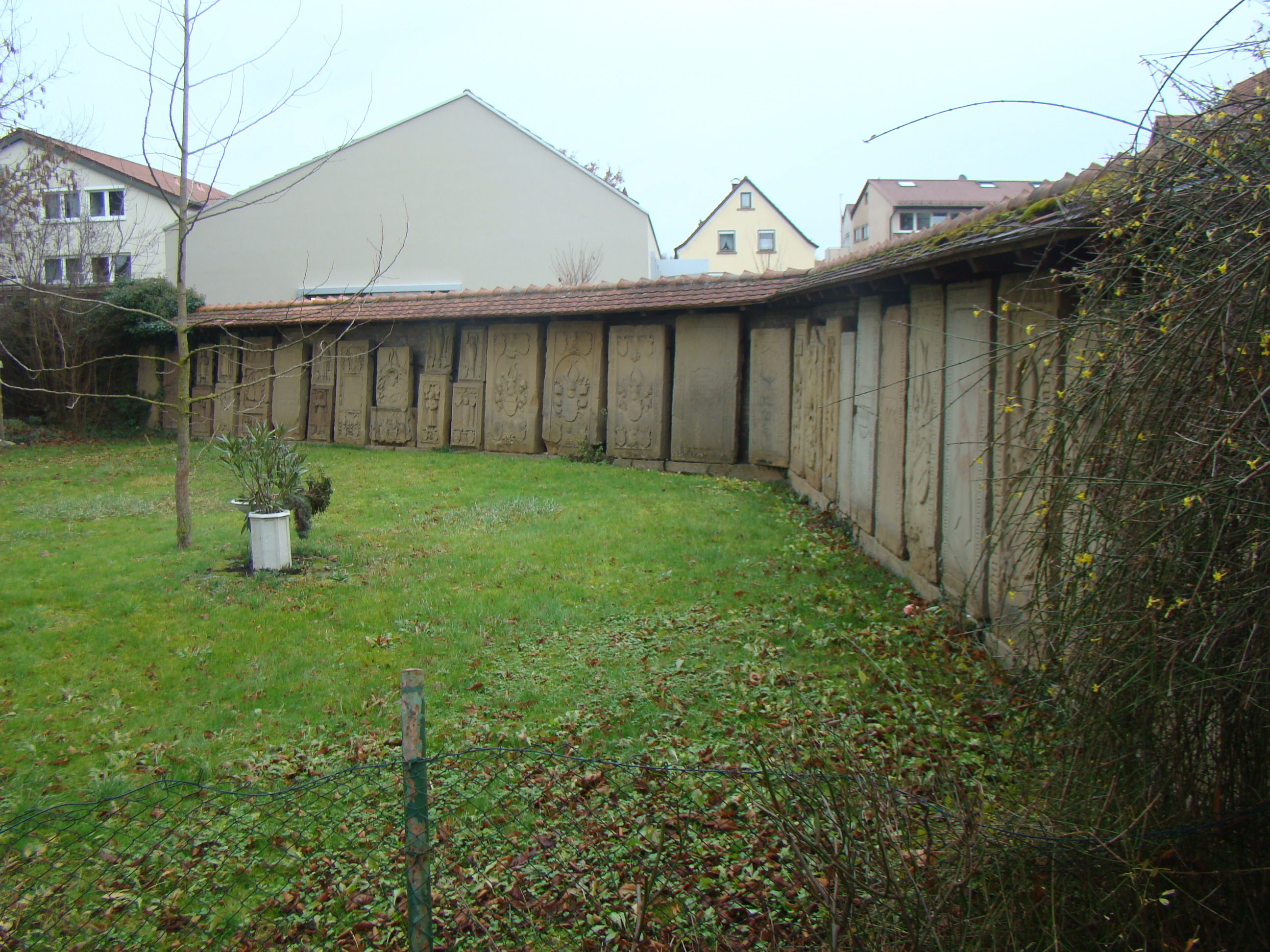 Historische Grabmale beim Unterschloss Gemmingen